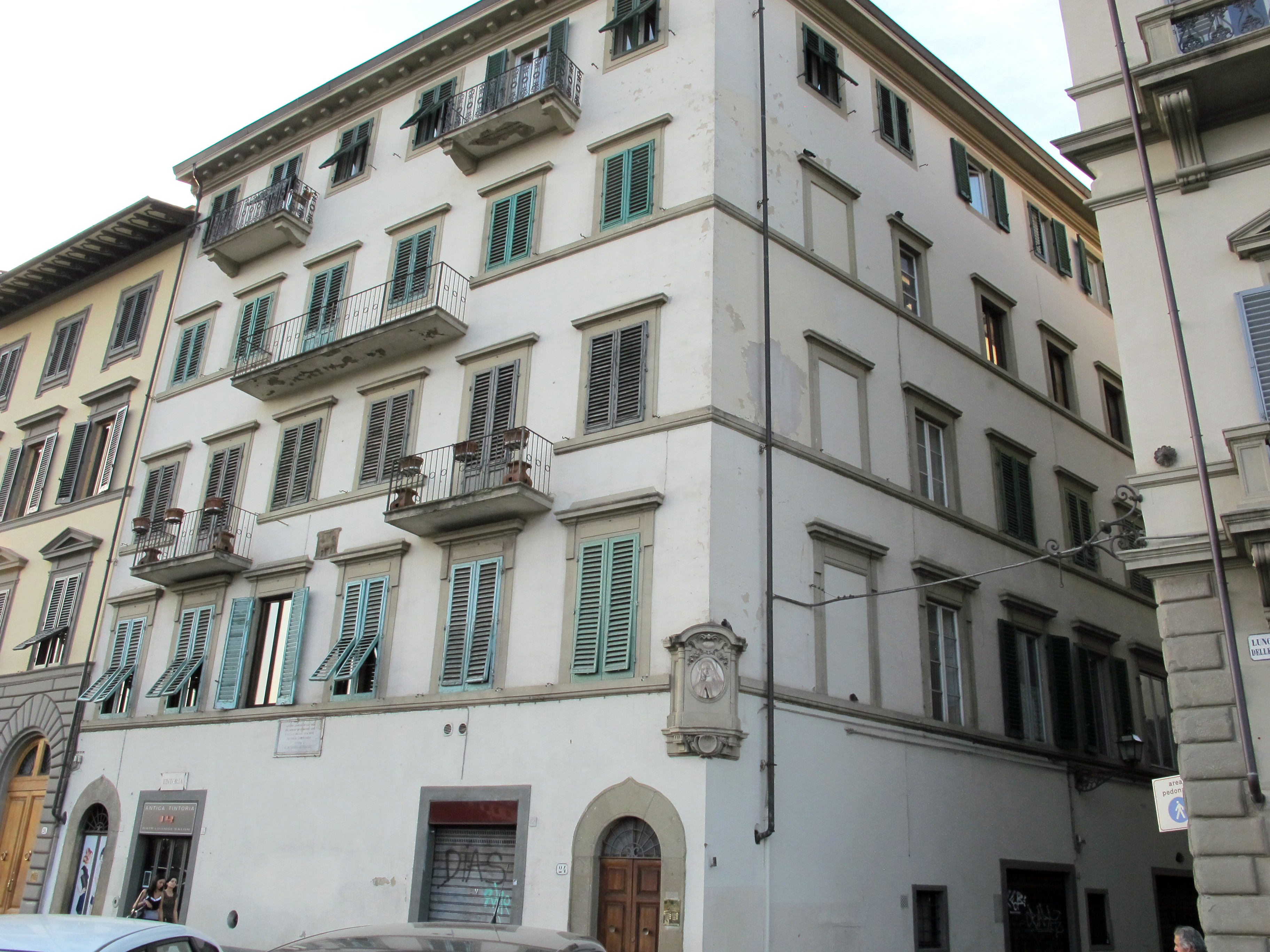 Casa di Niccolò Tommaseo dal lungarno